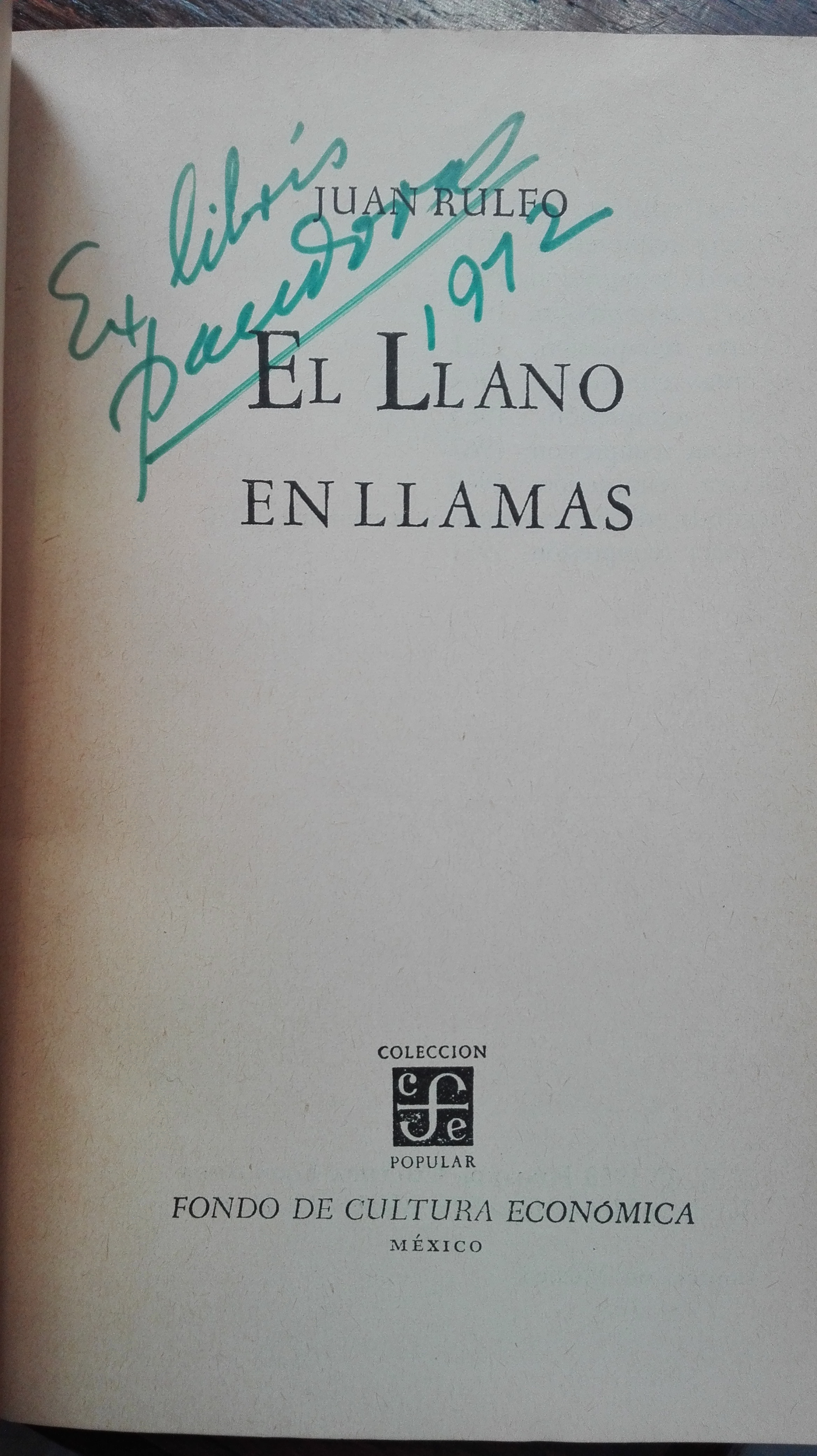 Ejemplo de ex libris en libro de cuentos de Juan Rulfo